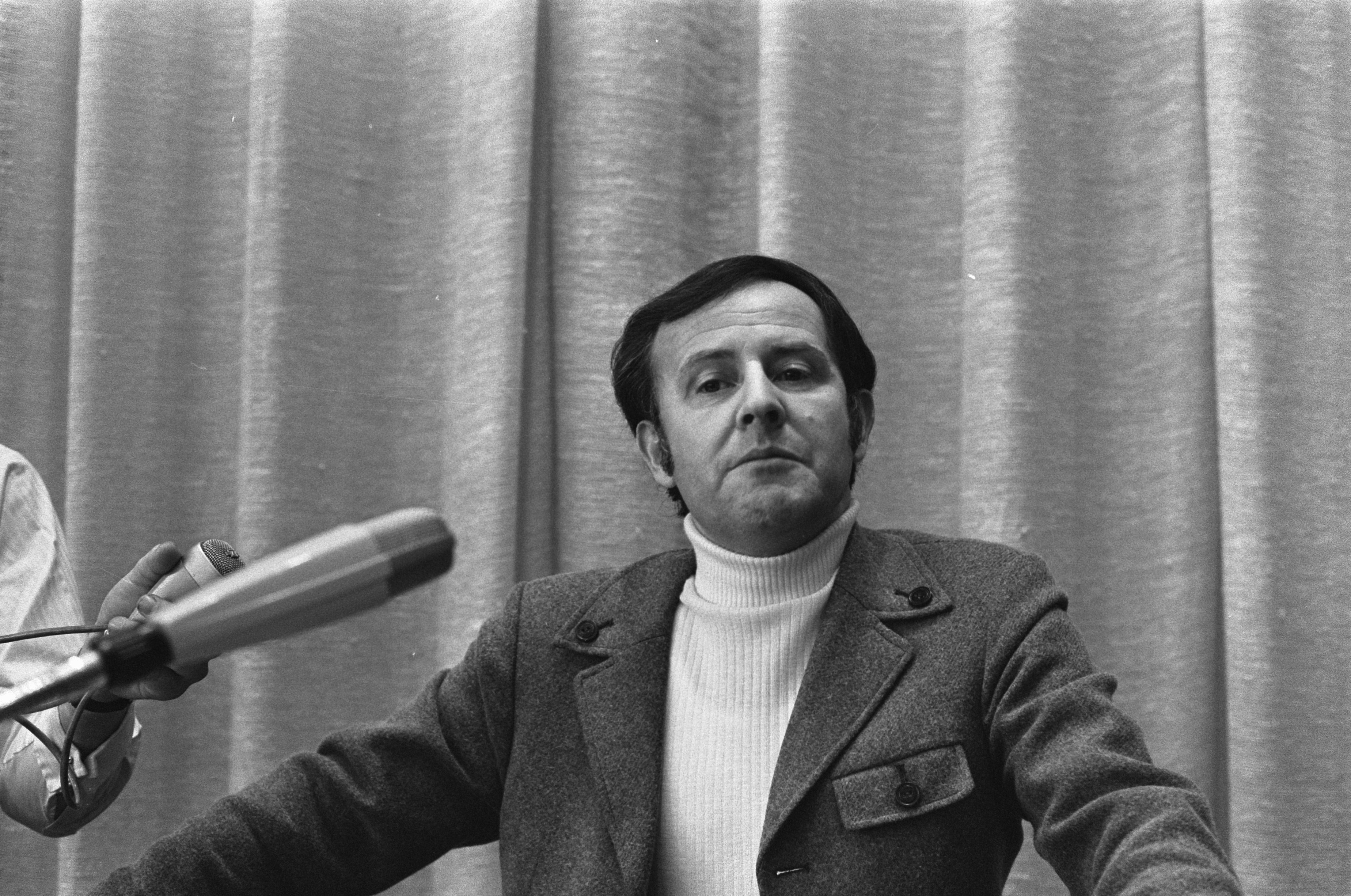 Collectie / Archief : Fotocollectie Anefo Reportage / Serie : [ onbekend ] Beschrijving : Congres "Wat bezielt die jongens in Hilversum" RAI Adam Nummers 7a Milo Anstaat Datum : 10 januari 1970 Locatie : Amsterdam, Noord-Holland Trefwoorden : congressen Instellingsnaam : RAI Fotograaf : Evers, Joost / Anefo Auteursrechthebbende : Nationaal Archief Materiaalsoort : Negatief (zwart/wit) Nummer archiefinventaris : bekijk toegang 2.24.01.05 Bestanddeelnummer : 923-1430